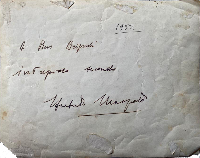 VI Gold Cup of the Dolomites - 1952 - Dedication of Count Umberto Marzotto to Pietro Brignoli AKA Pierbrì